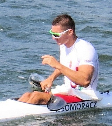 Sx50